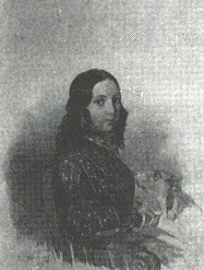 Надежда Николаевна Маслова (1804—1874), в первом браке была за Александром Михайловичем Полетикой, во втором за П. П. Ланским.